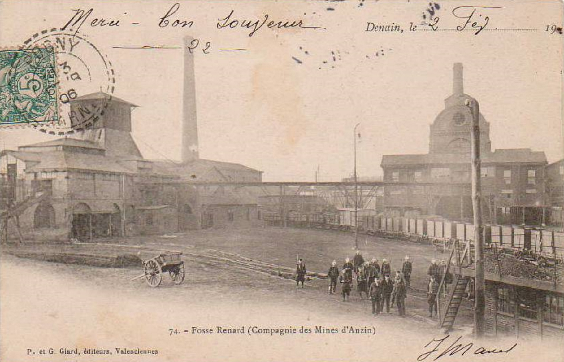 Fosse Renard de la Compagnie des mines d'Anzin, Denain, Nord, Nord-Pas-de-Calais, France.